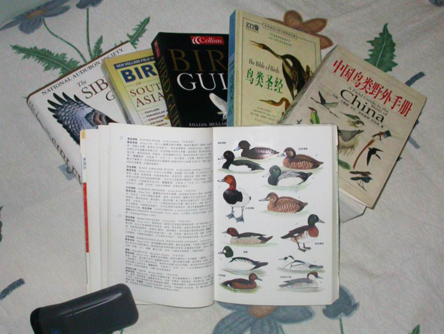 我的部分鸟类图鉴，自己拍摄，依次为：后排左起sibley guide to bieds（北美图鉴）birds of south east asia (东南亚图鉴) bird guide (欧洲图鉴) 鸟类圣经 (奥杜邦绘制的北美鸟类) 中国鸟类野外手册中文版，前排为香港和华南鸟类。